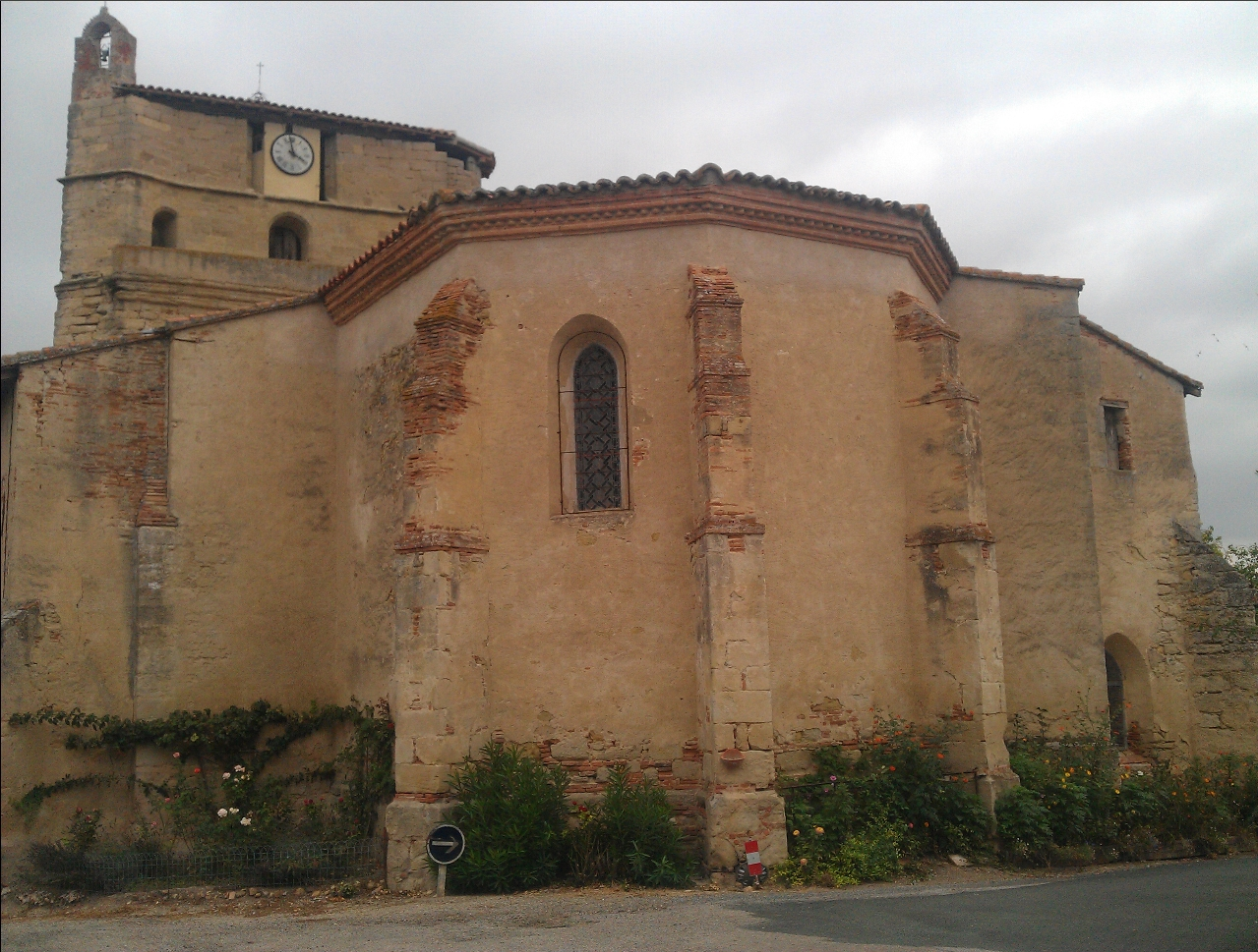 Église Saint-Étienne de Belcastel, (Inscrit, 2004) .